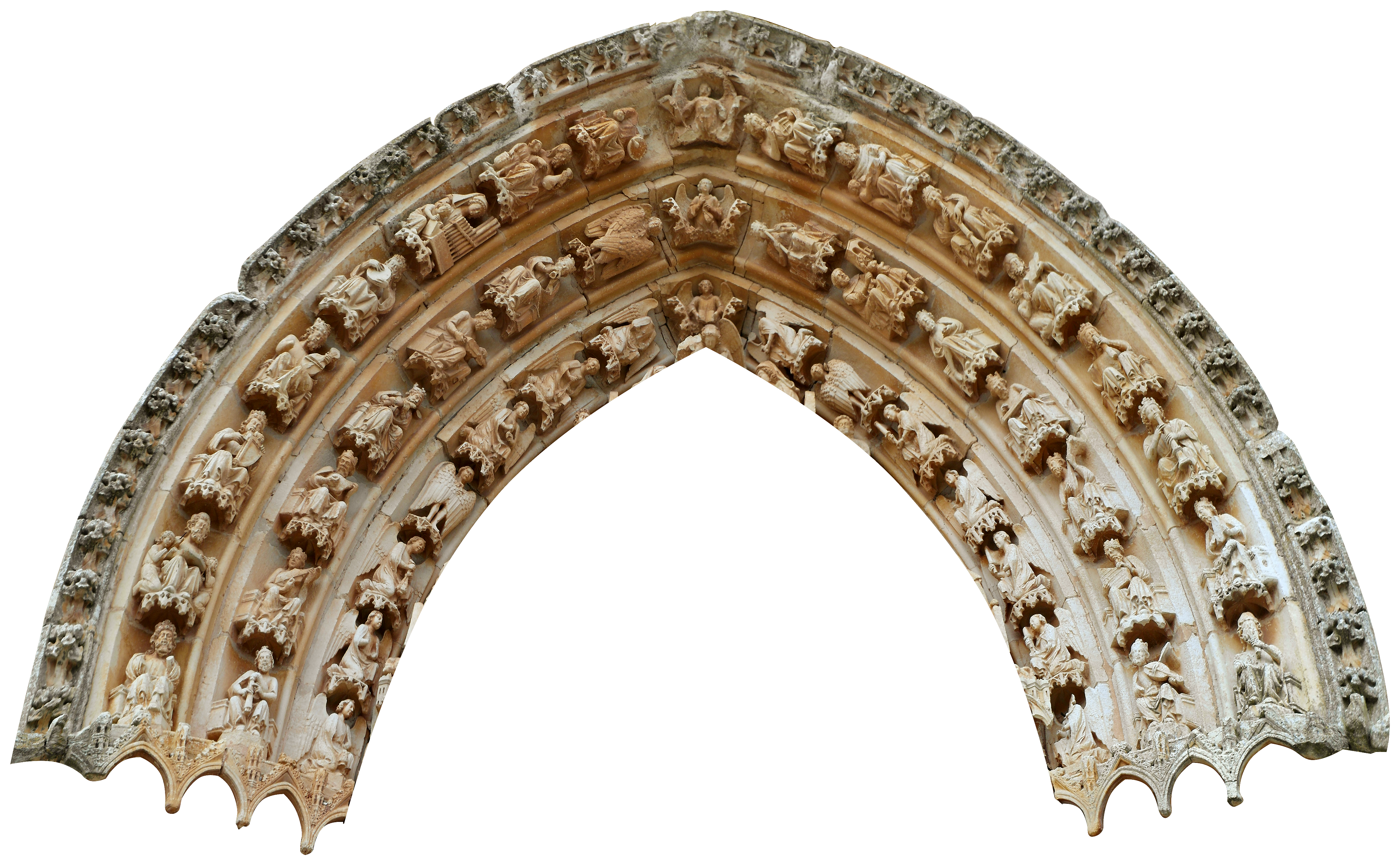 Sasamón, Burgos.